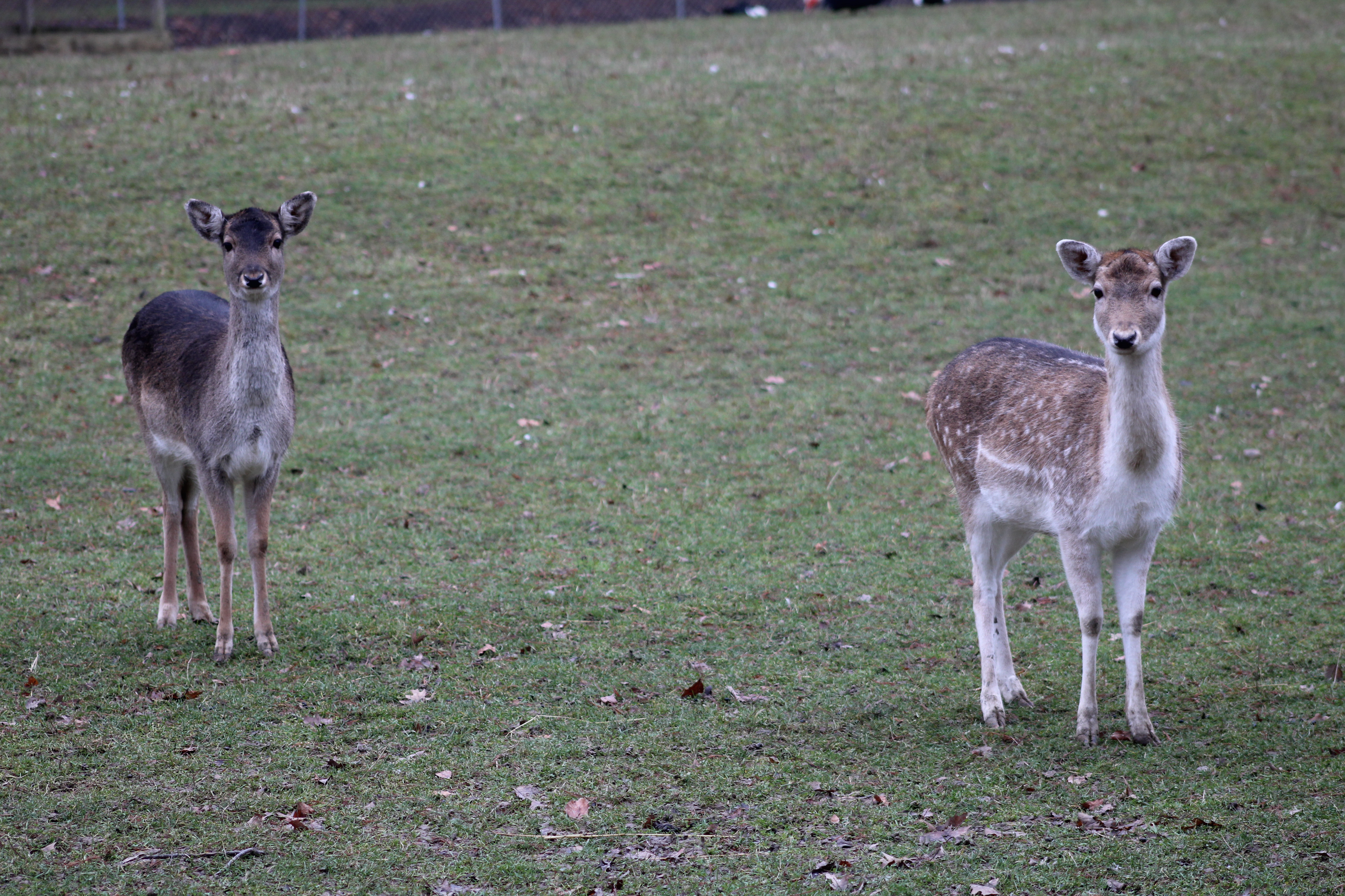 Animaux au parc municipal de Thoissey.